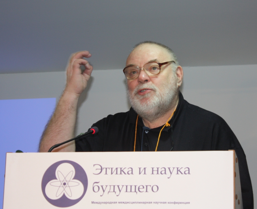 Линник Юрий Владимирович выступает с докладом на Международной Научной Конференции "Этика и Наука Будущего"